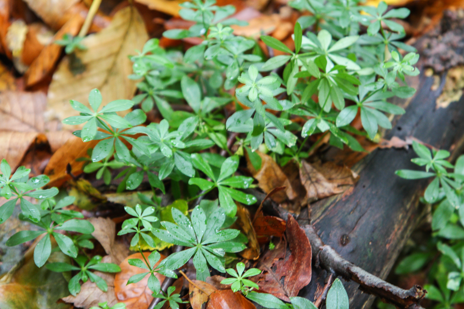 Porost sleziníku vonného (Galium odoratum) na svazích Růžovského vrchu.